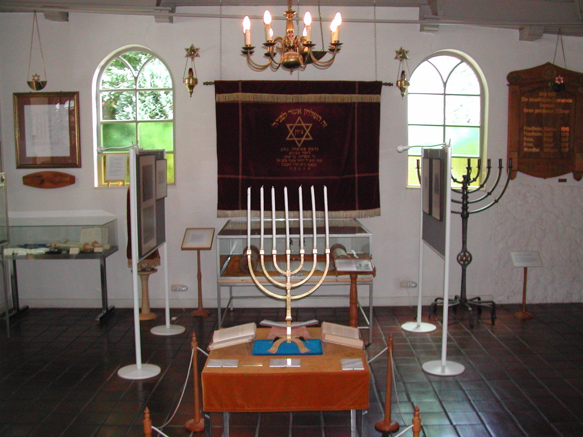 Jewish Museum in Dornum